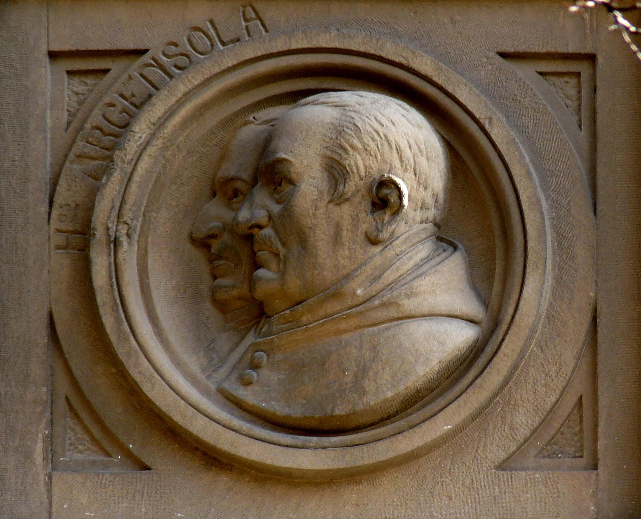 Zaragoza - Grupo escolar Gascón y Marín - Detalle de fachada: Hermanos Argensola